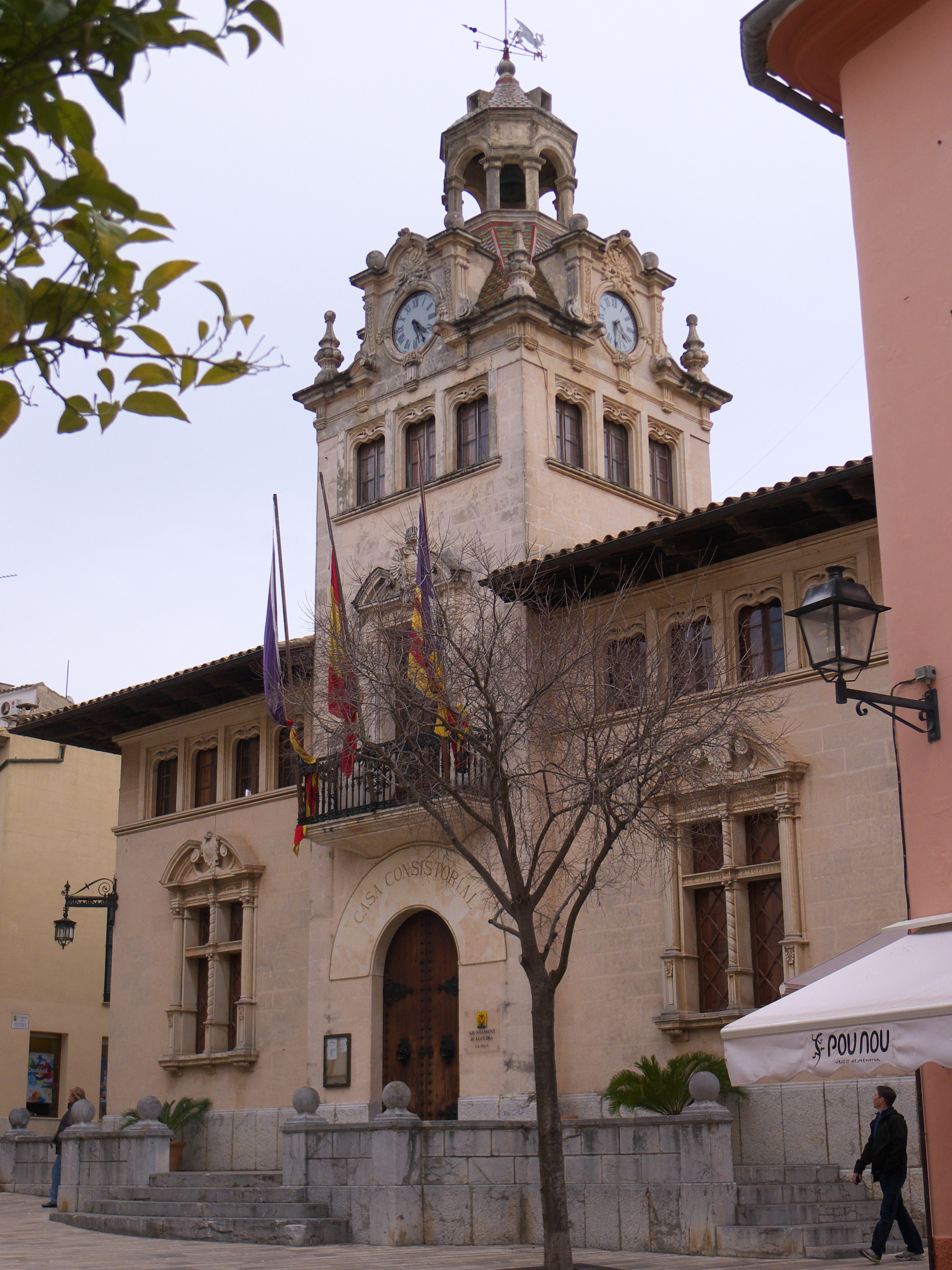 En el año 1929 el arquitecto Carlos Garau Tornabells firma este acertado edificio. Considerado entre los mejores de la arquitectura racionalista balear.